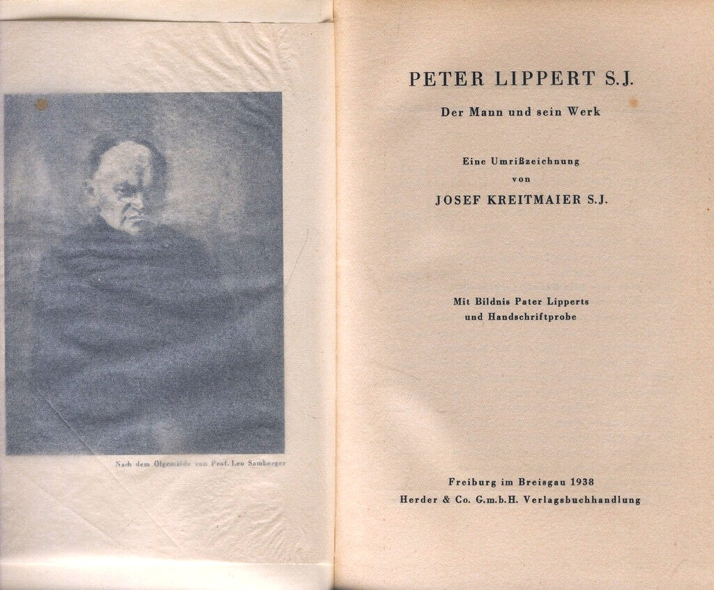 Josef Kreitmaier: Peter Lippert S.J. - Der Mann und sein Werk. Freiburg i. Br. 1938, Titelseite